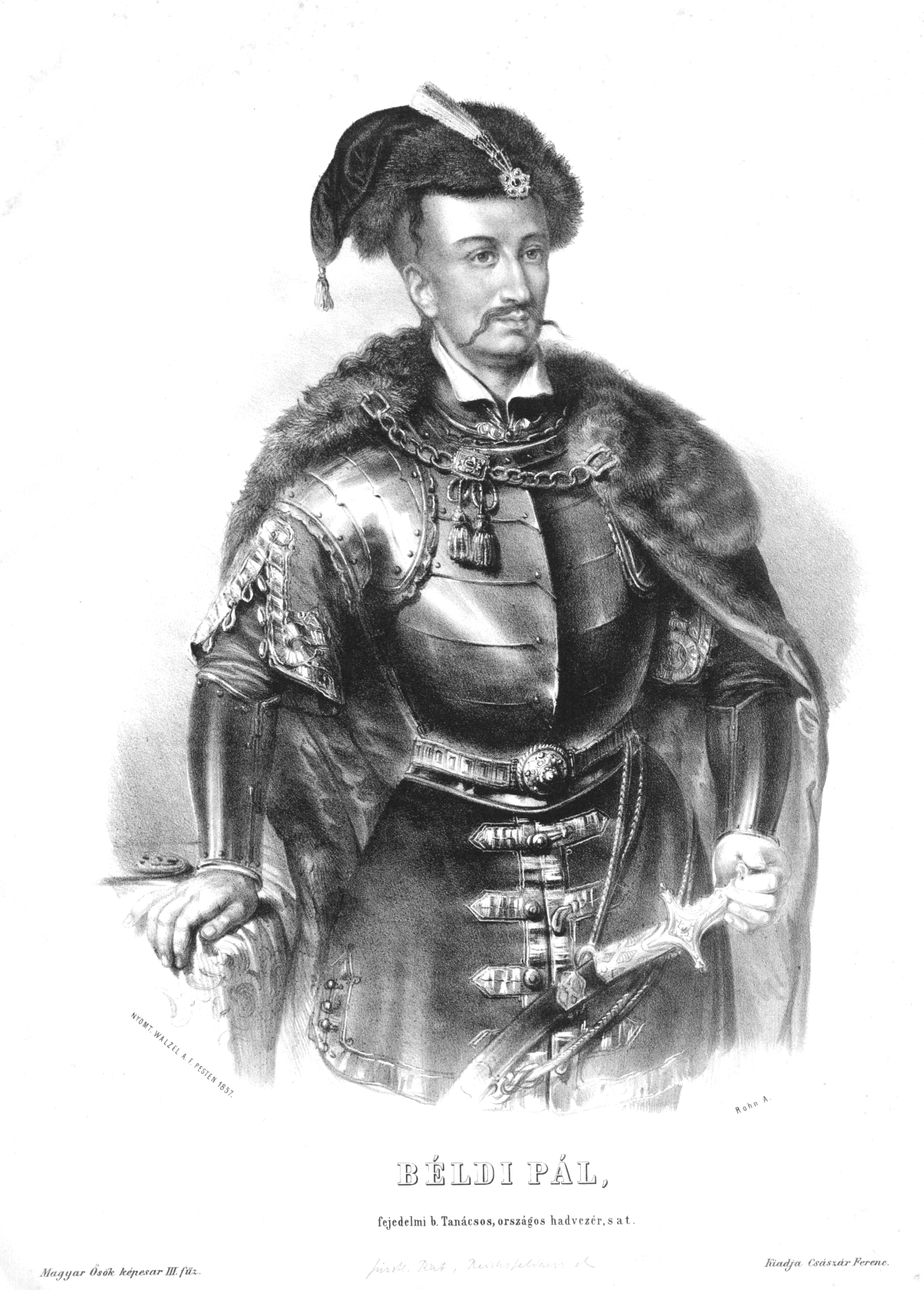 Uzoni Béldi Pál (1621. – Isztambul, 1679.) erdélyi nemesi család sarja, főasztalnok, Háromszék főkirály bírája és a sereg generálisa, Belső-Szolnok vármegye főispánja